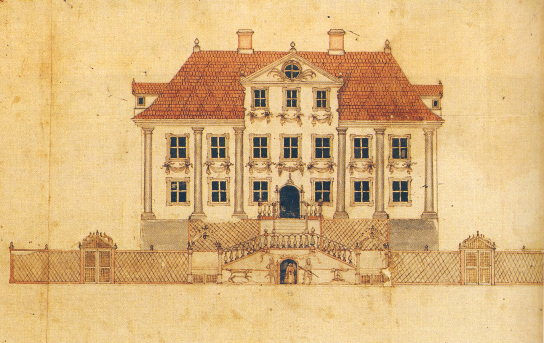 Malmgården Alstavik på Långholmen, fasad